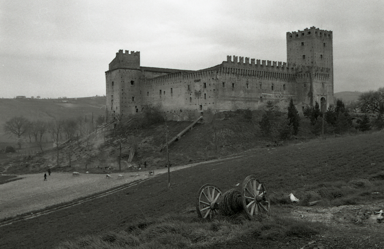 Servizio fotografico : Camerino, 1970 / Paolo Monti. - Strisce: 7, Fotogrammi complessivi: 36 : Negativo b/n, gelatina bromuro d'argento/ pellicola ; 35 mm. - ((I fotogrammi hanno una doppia numerazione. . - Sul portanegativi: Nikormat FP4. - Sul dorso del portanegativi Monti specifica: "Marche. T.C.I. Camerino con neve". - Occasione: Documentazione per la pubblicazione di: "TOURING CLUB ITALIANO, Marche, Milano, TCI, 1971". - Fonte: Monografia di Touring Club